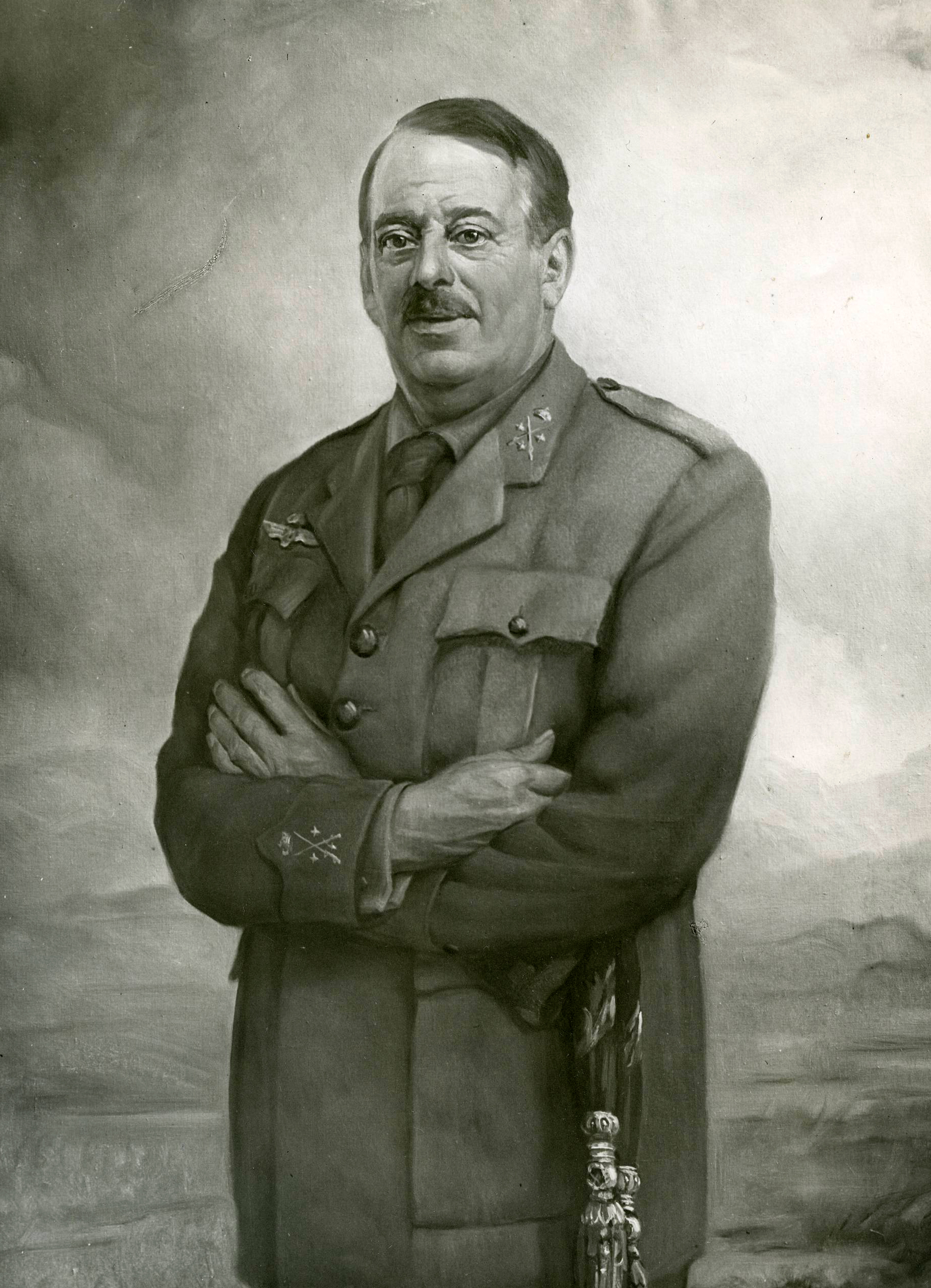 Retrato fotográfico de un cuadro del general Sanjurjo Sacanell